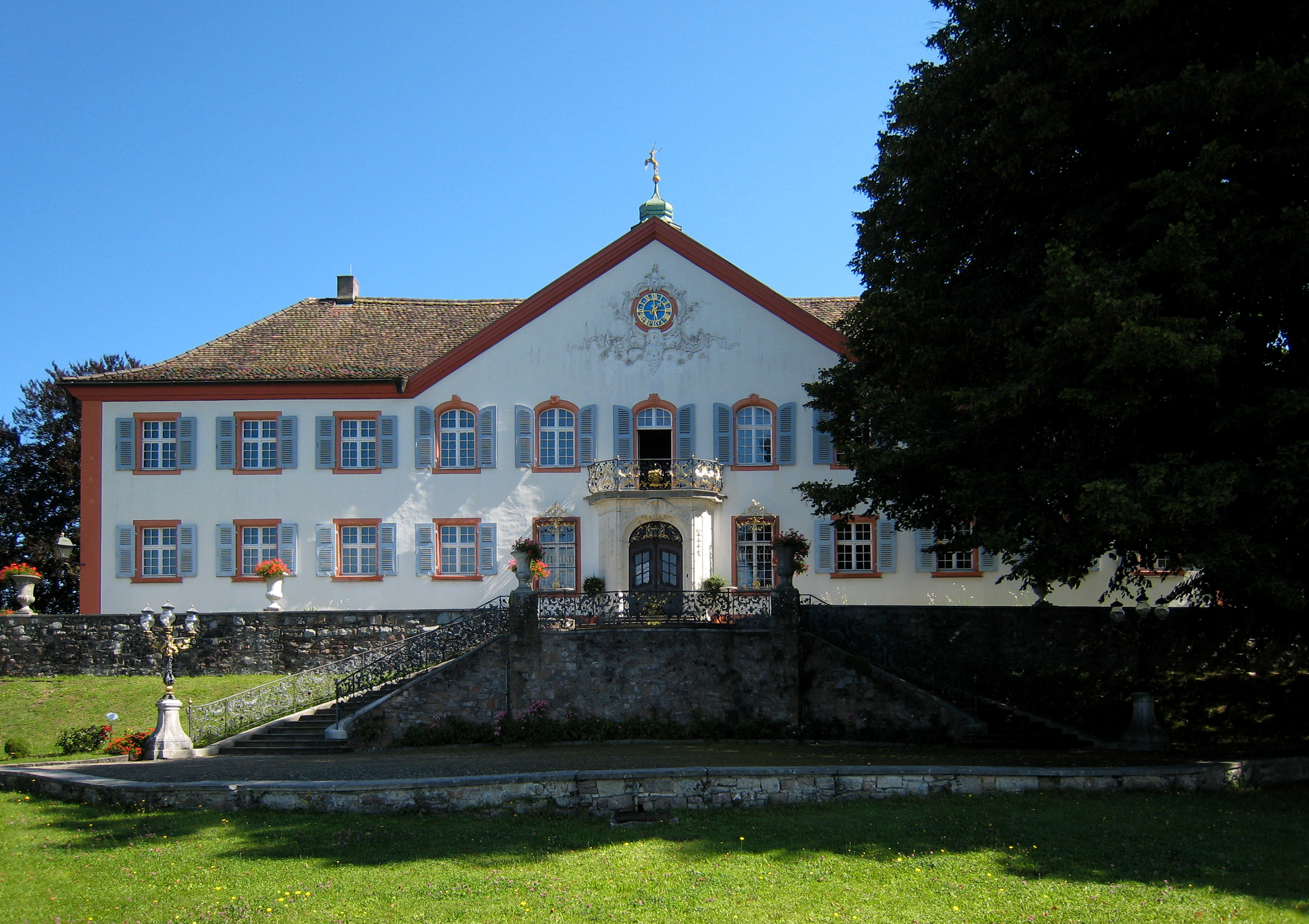 Schloss Bürgeln bei Schliengen im Süd-Schwarzwald/Deutschland